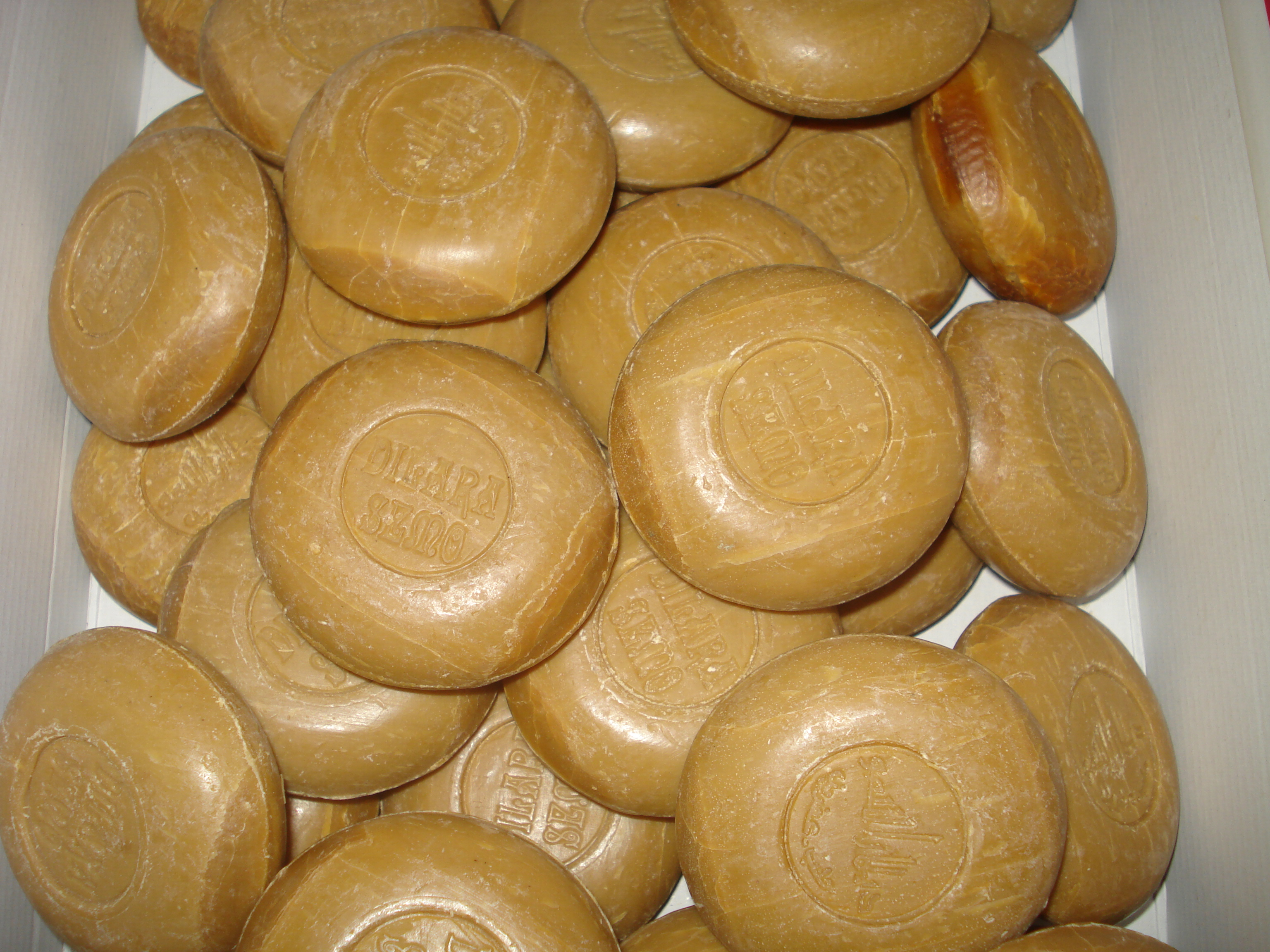 Savons d'Alep moulés de forme ronde de la marque Diwara Semo, avec 5 % d'huile de baies de laurier. Photo de 2010